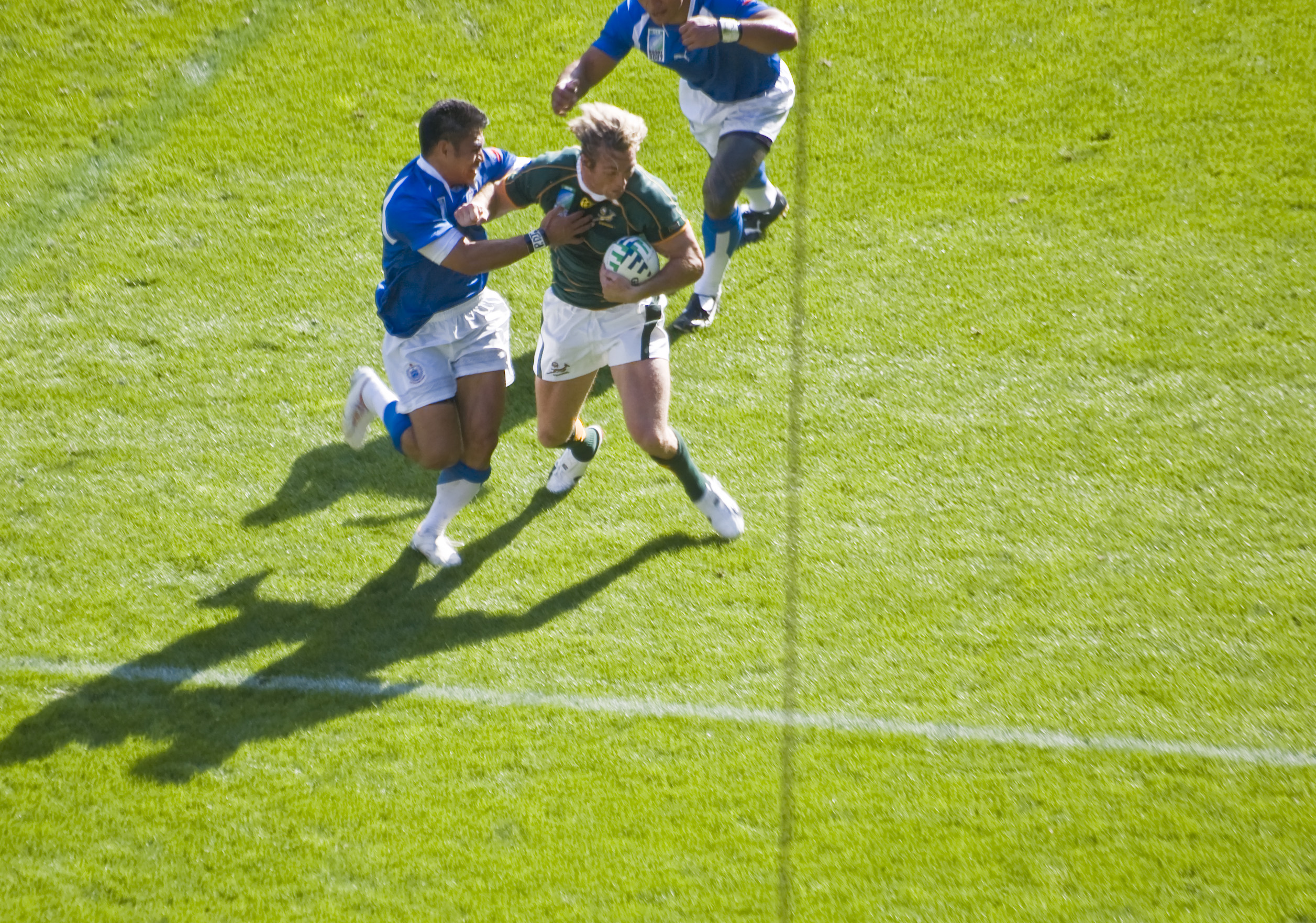 Percy Montgomery op pad om 'n drie te druk in die Springbokke se Poel A wedstryd teen Samoa by die 2007 Rugby Wêreldbeker.